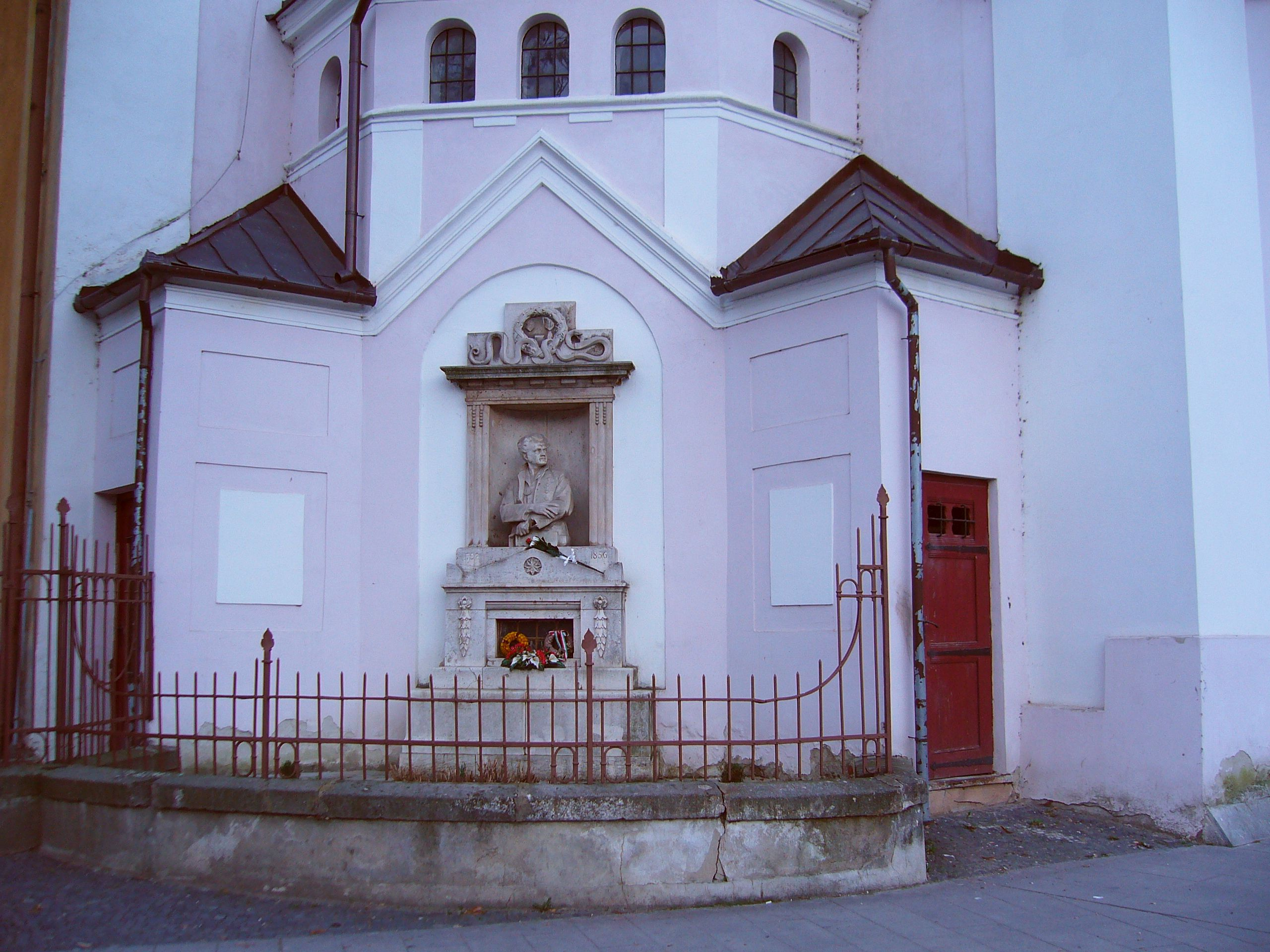 Rimaszombat, Ferenczy István emlékműve